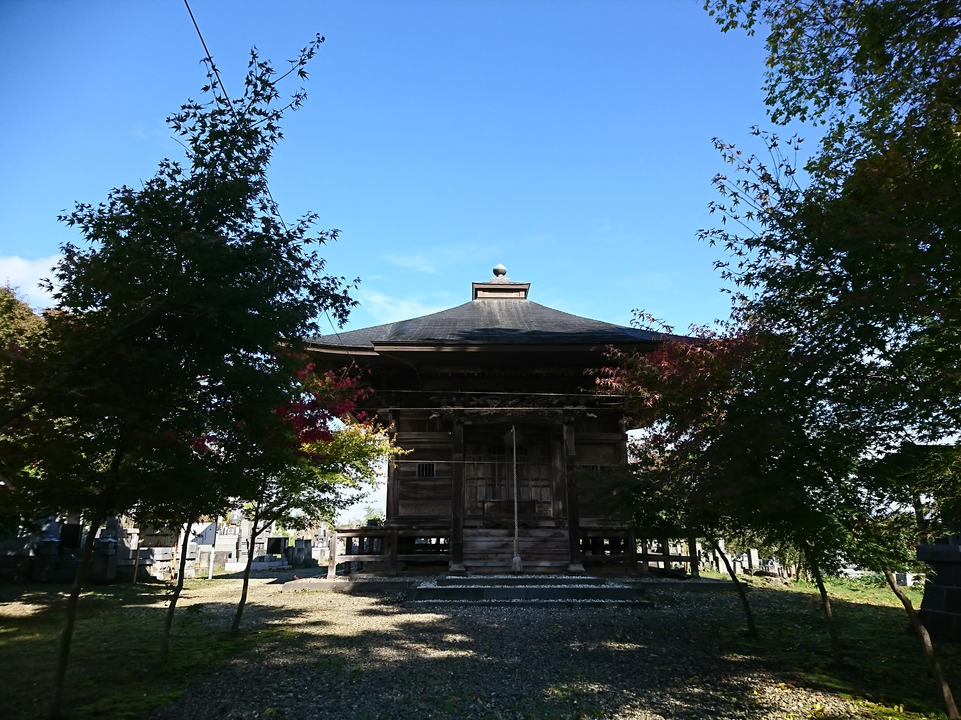 会津薬師寺の薬師堂